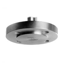 Druckmittler der Firma Labom GmbH